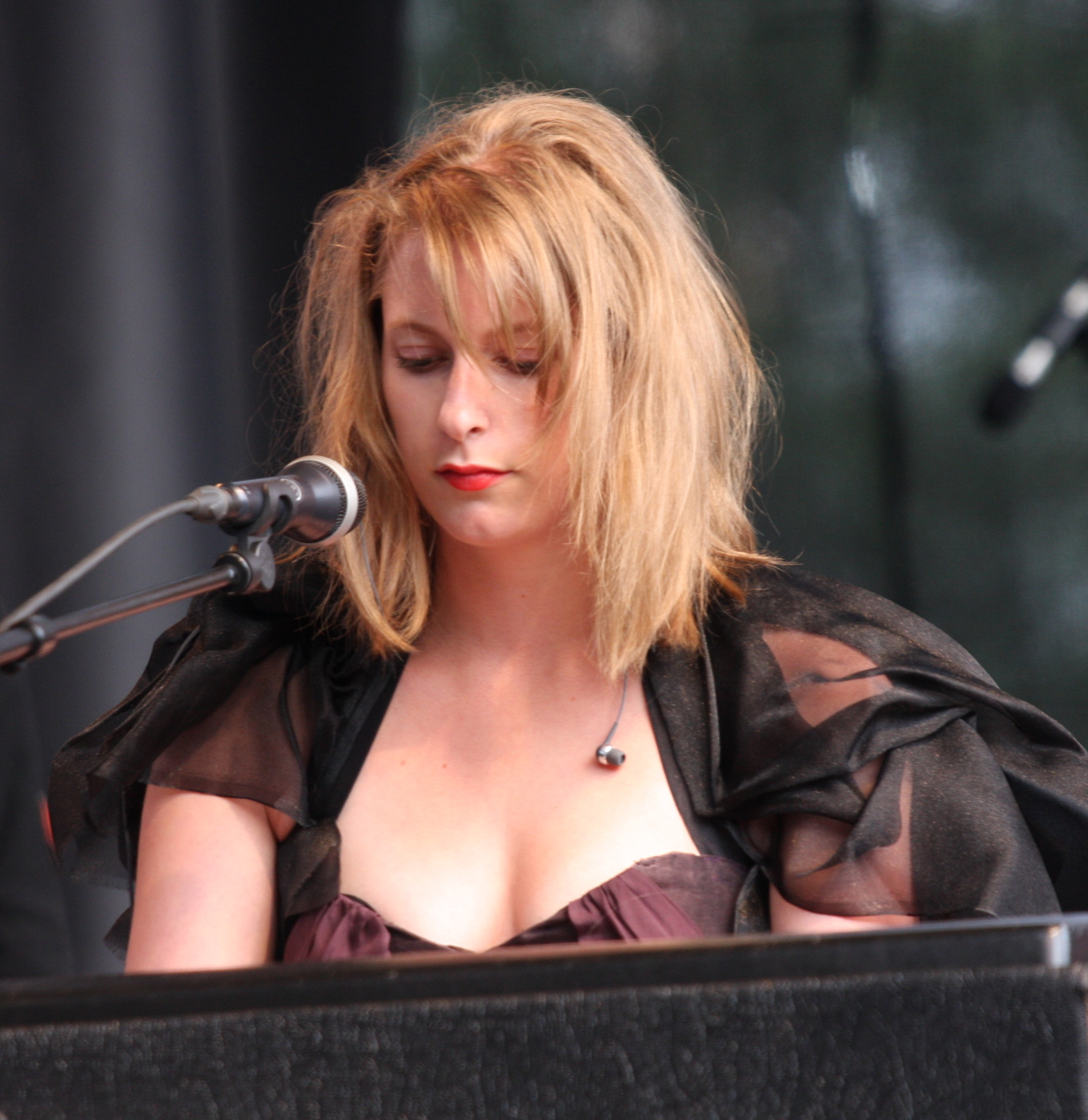 Susanne Sundfør norsk artist - Her i VG-lista i Stavanger